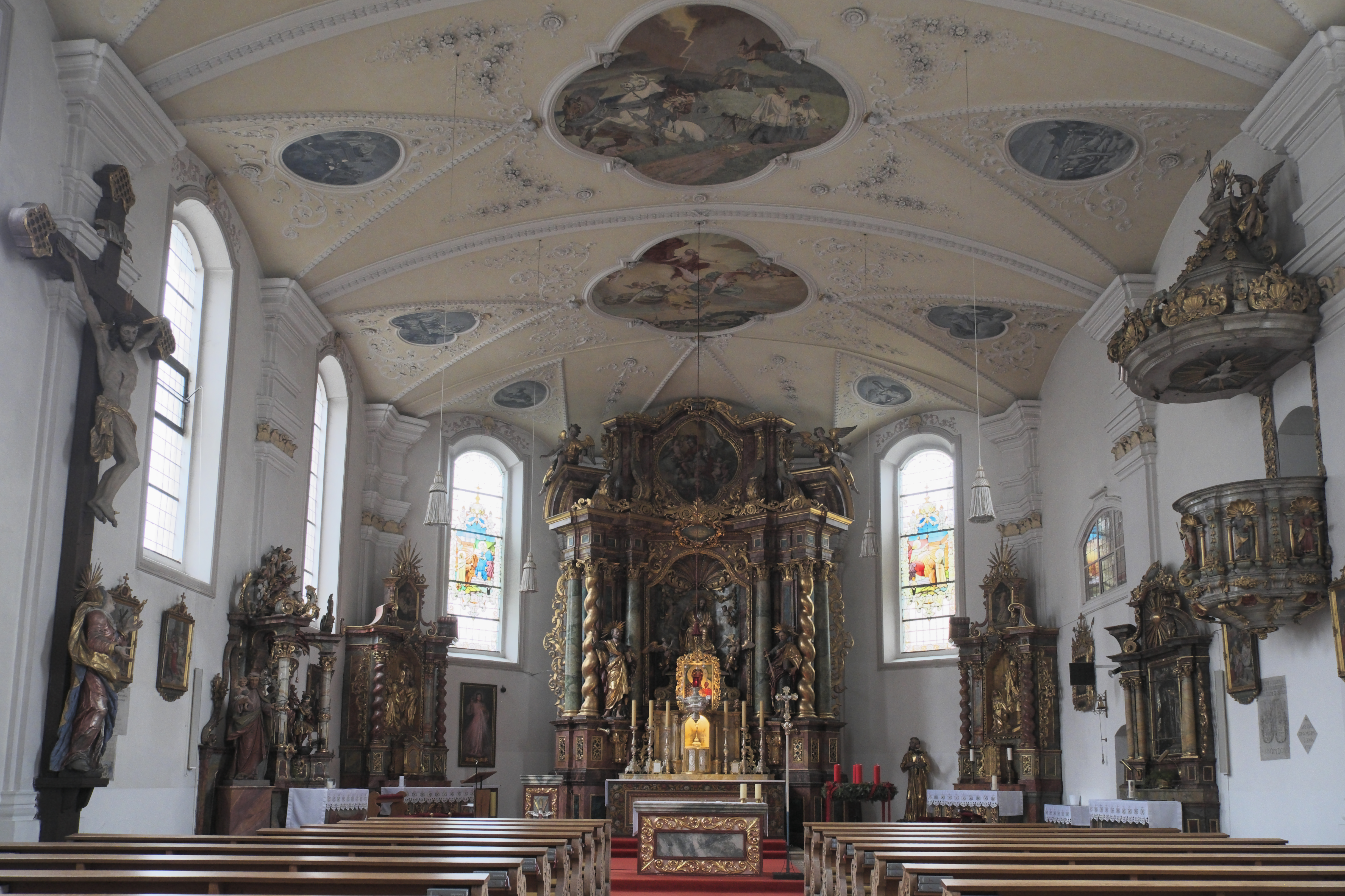 Katholische Klosterkirche der Pauliner St. Peter und Paul, ehemalige Wallfahrtskirche St. Salvator, in Mainburg im niederbayerischen Landkreis Kelheim (Bayern/Deutschland)